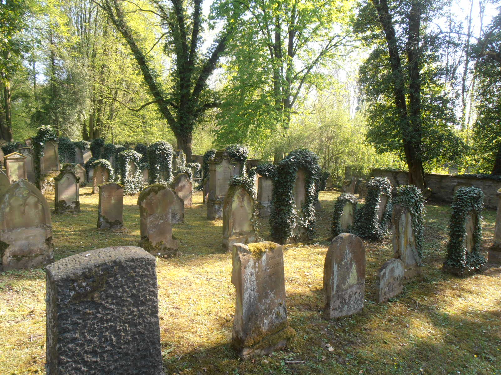 Mazewot im Jüdischen Friedhof Sontheim, an der Schozach